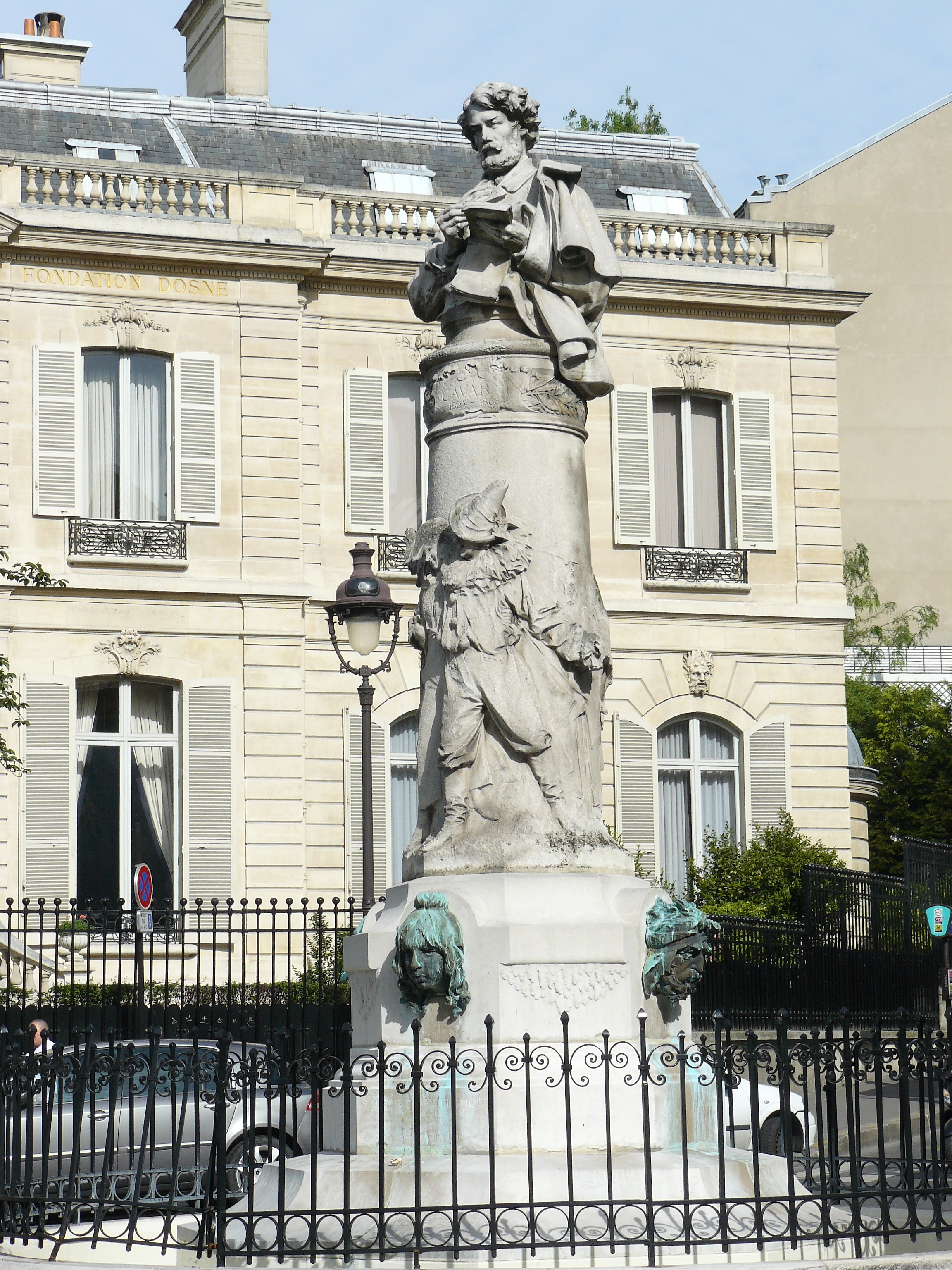 Fontaine Gavarni, place Saint-Georges (Paris, 9e arrond.). Sculpteur Denis Puech (1854-1942).